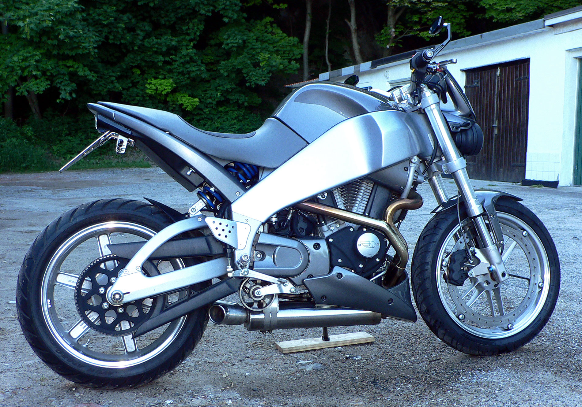 Buell Lightning XB9S (2003)